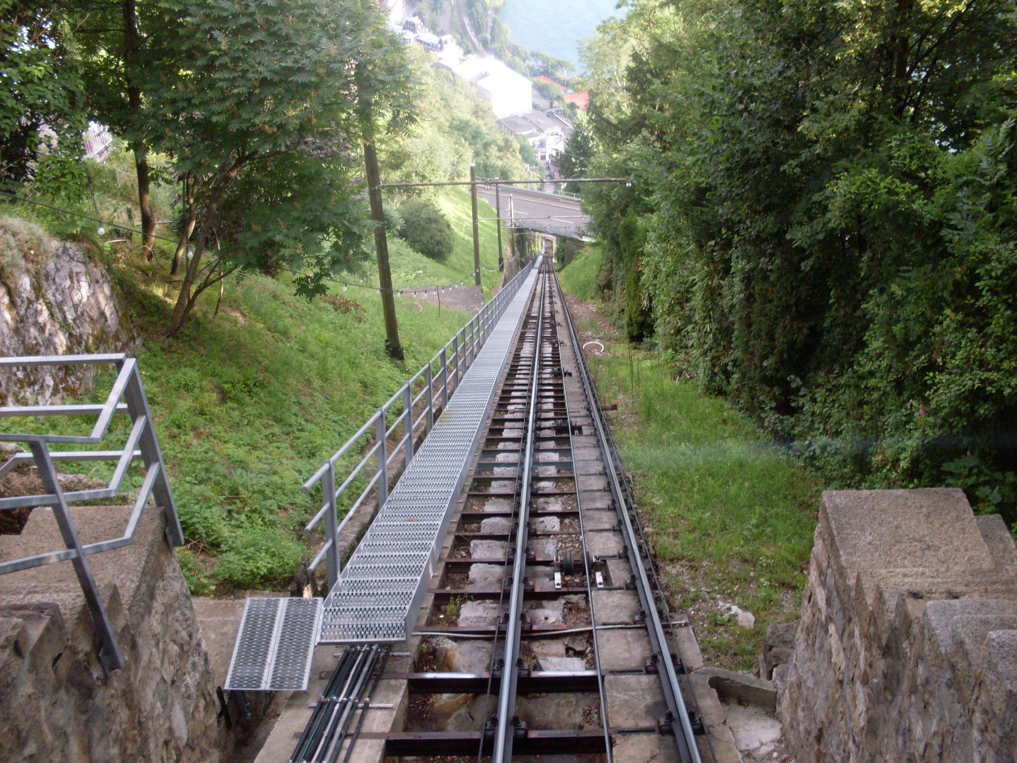 Von Glion nach Territet mit der Standseilbahn, Schweiz